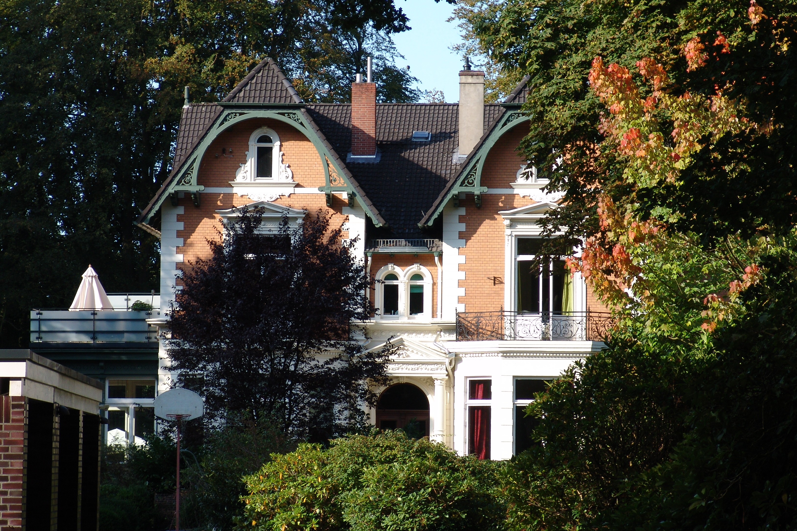 Villa Waldwiese, Villa Klosterkämper in Bremen, Am Lindenberg 18A.Das abgebildete Objekt ist ein geschütztes Kulturdenkmal in der Freien Hansestadt Bremen, mit der Nr. 1774 beim Landesamt für Denkmalpflege registriert.